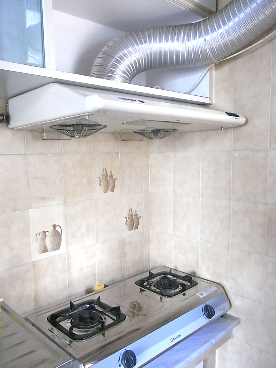 中文（香港）: 廚房